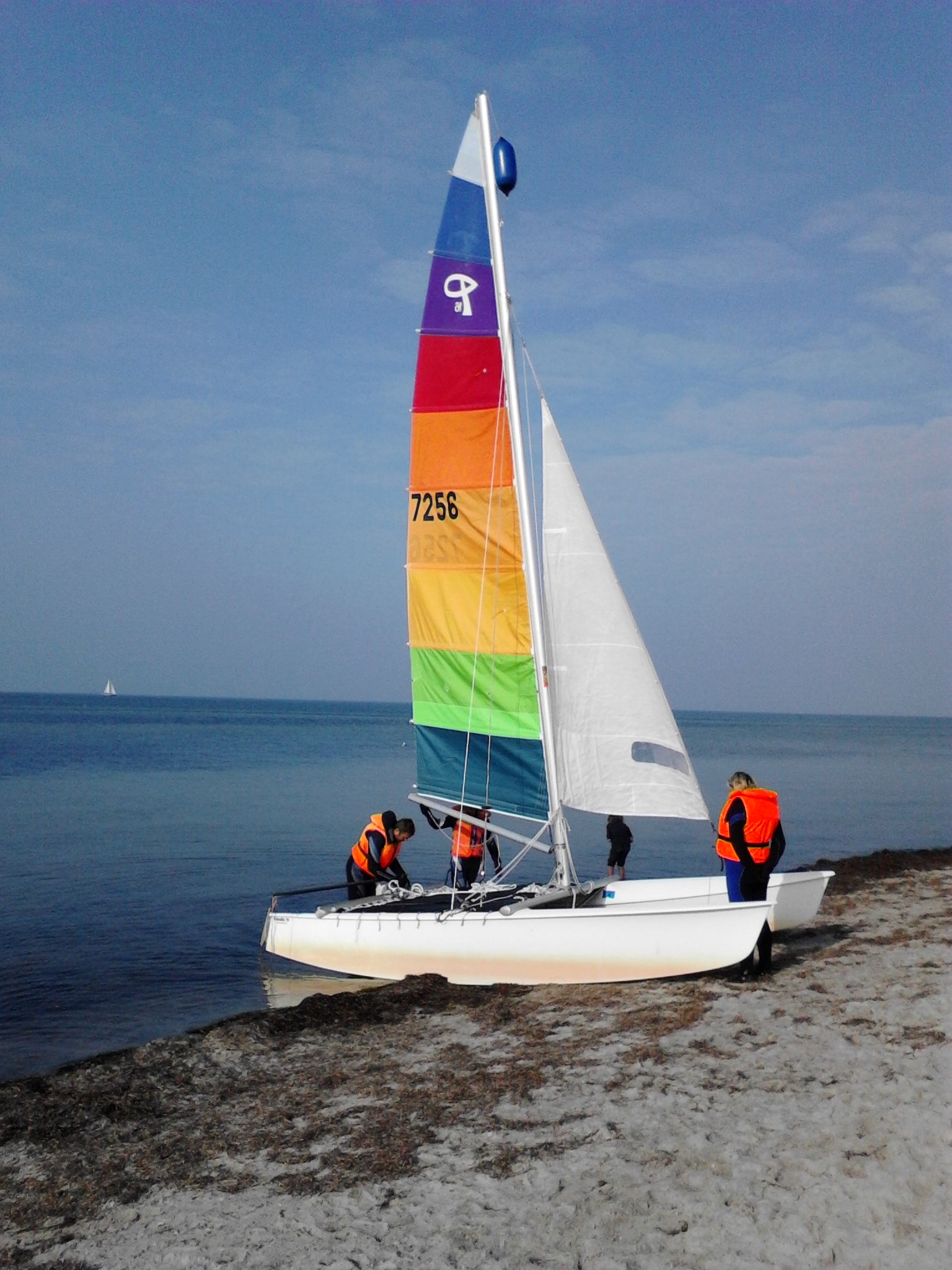 Katamaran vom Typ Prindle 16 Fuss am Strand von der Ostsee Insel Poel. Vorbereitung und Sicherheitseinweisung zum Katamaran Segeln auf der Ostsee vor der Insel Poel - Wismarer Bucht.